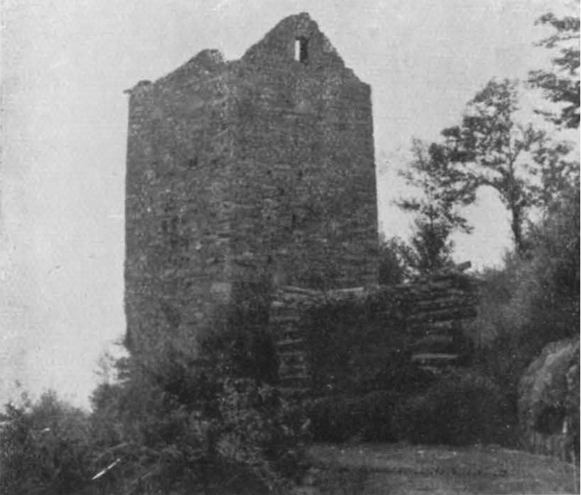 Cardezza, torre di vedetta